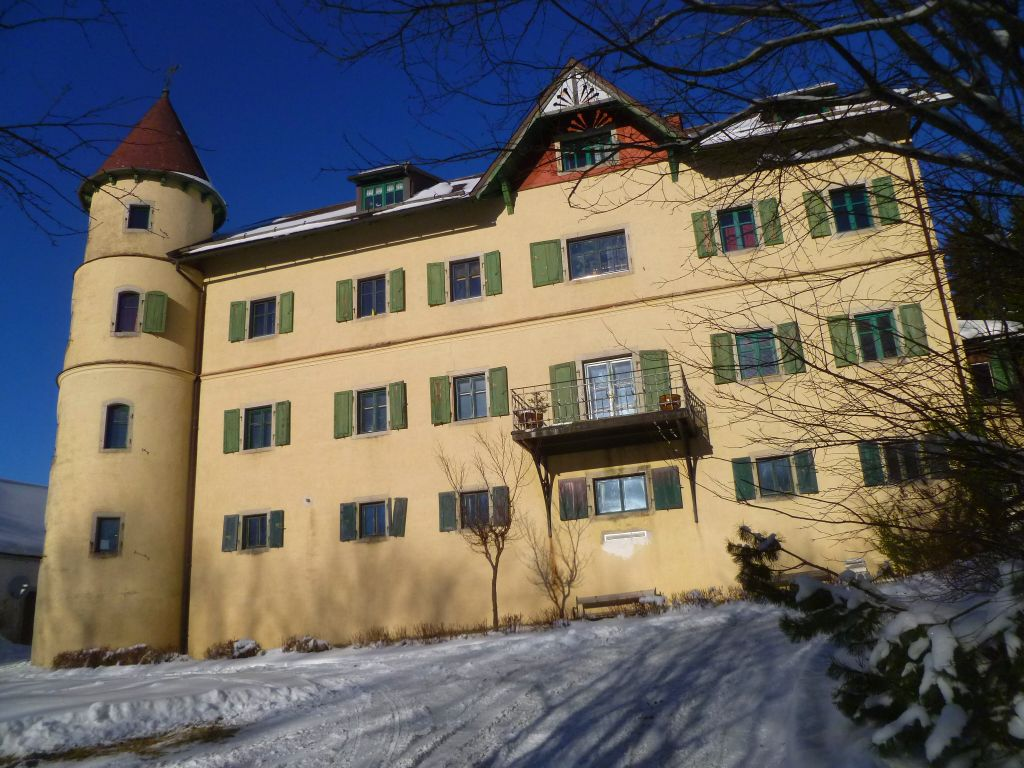 Schloss Brunnwald heute